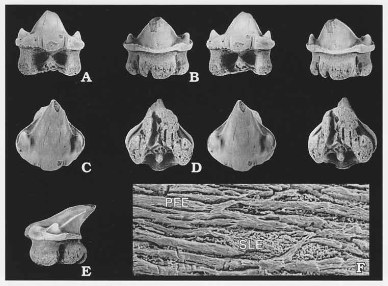 Agaleus dorsetensis Duffin & Ward, 1983.A -E. LO7967t in labial (A), lingual (B), occlusal( C), basal (D) views (stereo pairs) and in lateral view (E); x 3. F. SEM micrograph showing the ultrastructure including shiny layered enameloid (SLE) and parallel fibred enameloid (PFE) x 500.